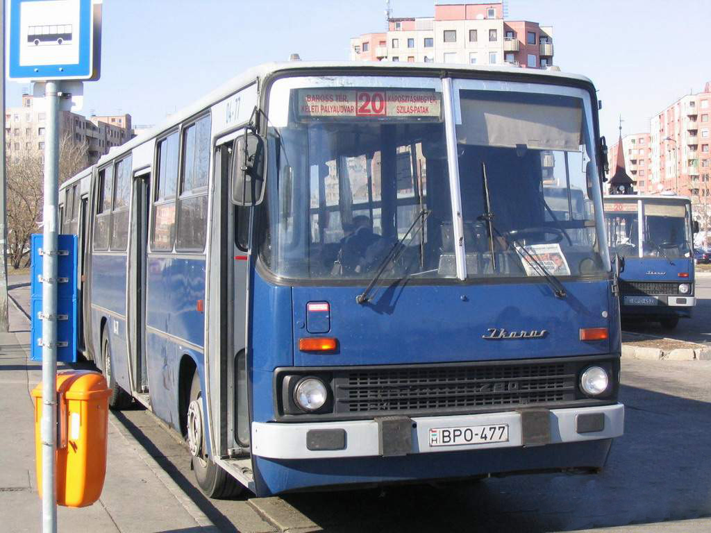 Piros 20-as a káposztásmegyeri végállomáson